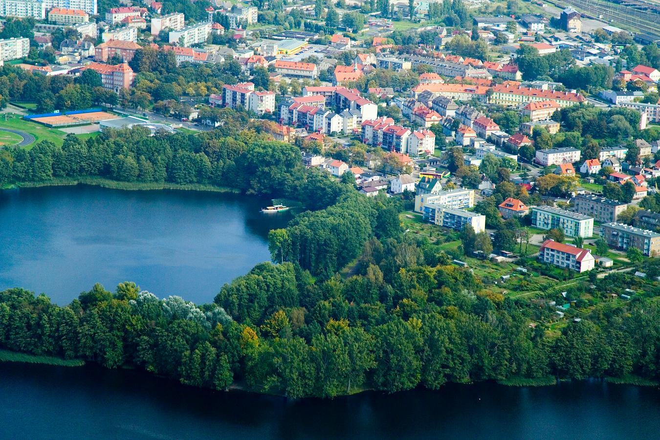 Szczecinecki Tramwaj Wodny "Bayern" 8